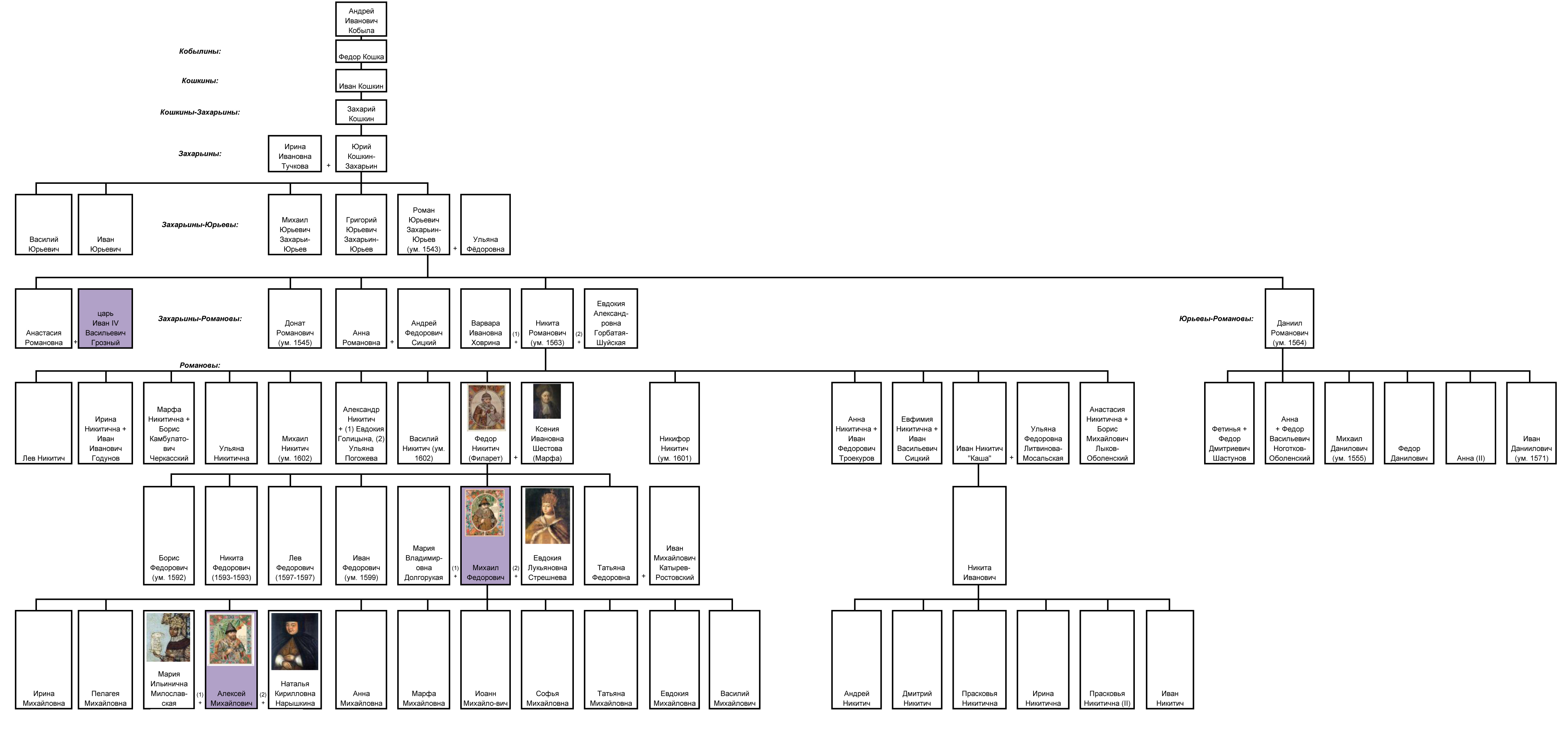 Генеалогическое древо дома Романовых (с 1347 по 1917 год: с возникновения боярской династии Захарьиных-Кошкиных-Романовых до Революции)